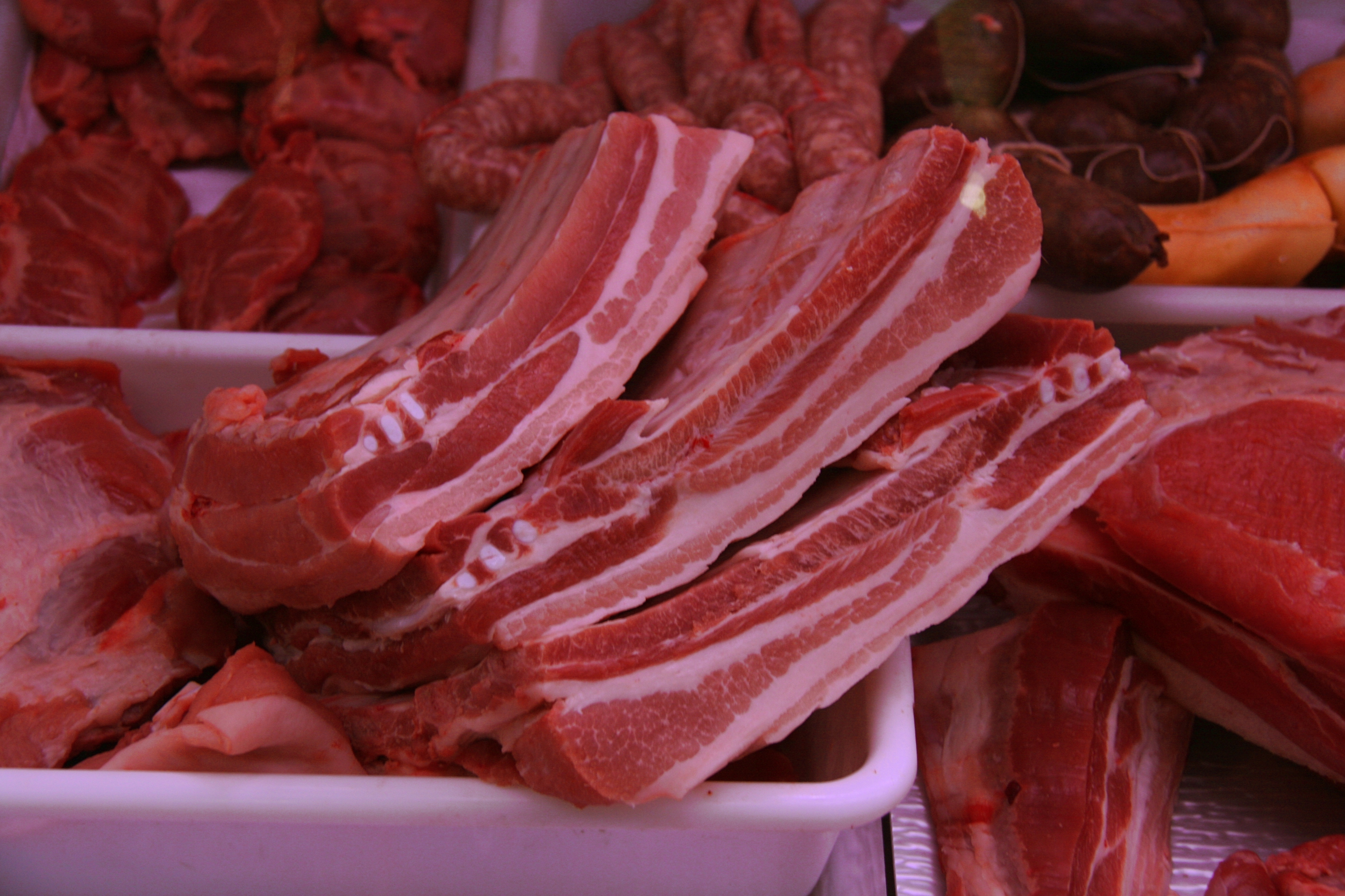 Panceta - España